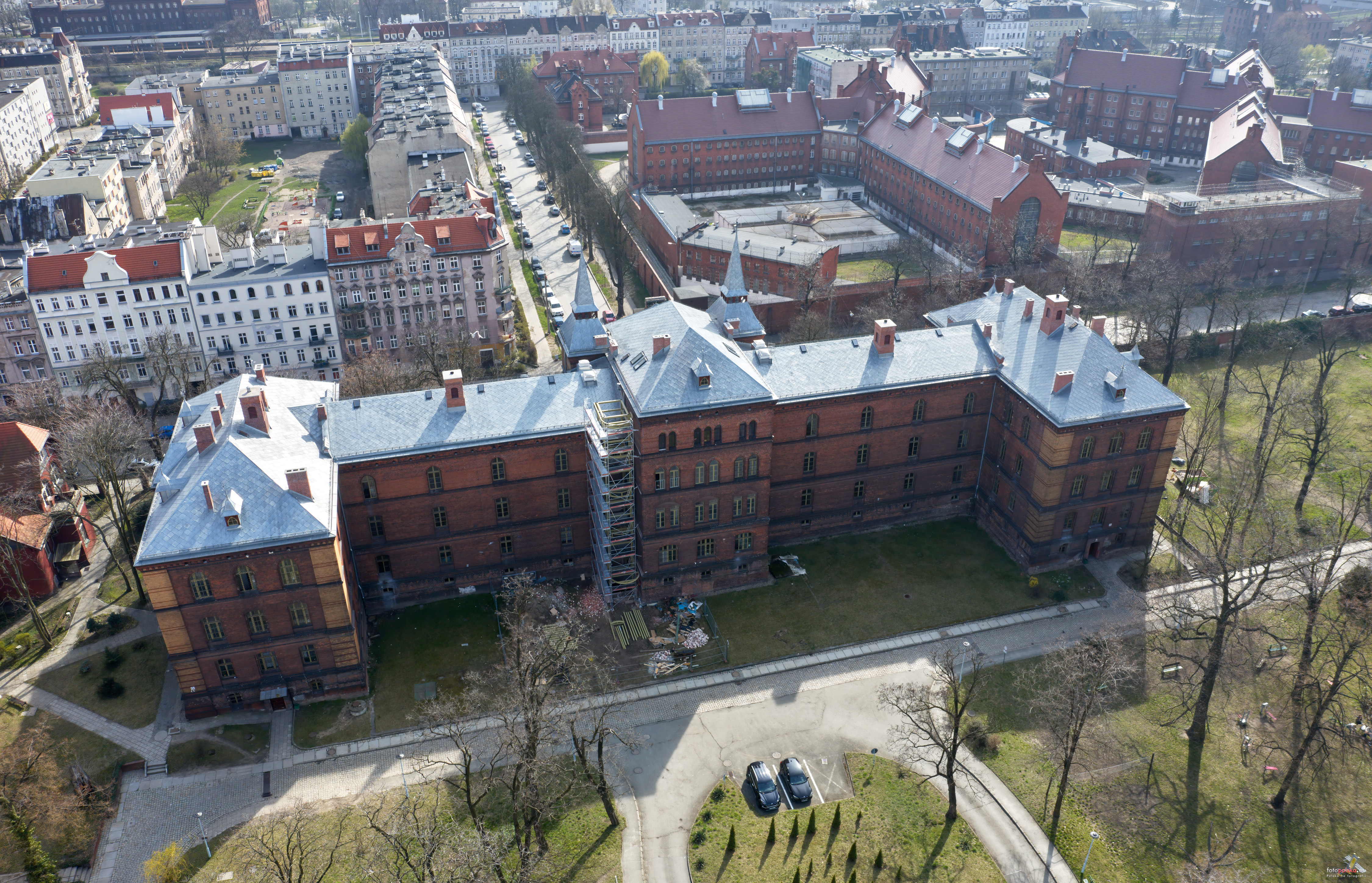 Wrocław - Kleczków: na pierwszym planie budynek Dolnośląskiego Centrum Zdrowia Psychicznego przy ul. Kraszewskiego, za nim po prawej zabudowania Zakładu Karnego nr 1 przy ul. Kleczkowskiej